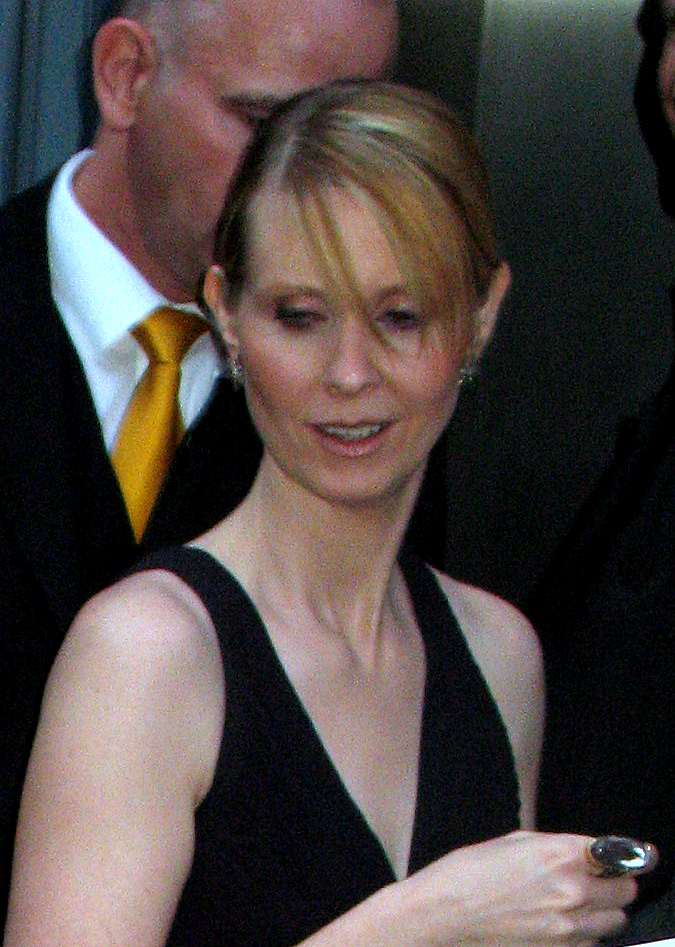 Cynthia Nixon bei der Premiere von Sex and The City Berlin, 15. Mai 2008